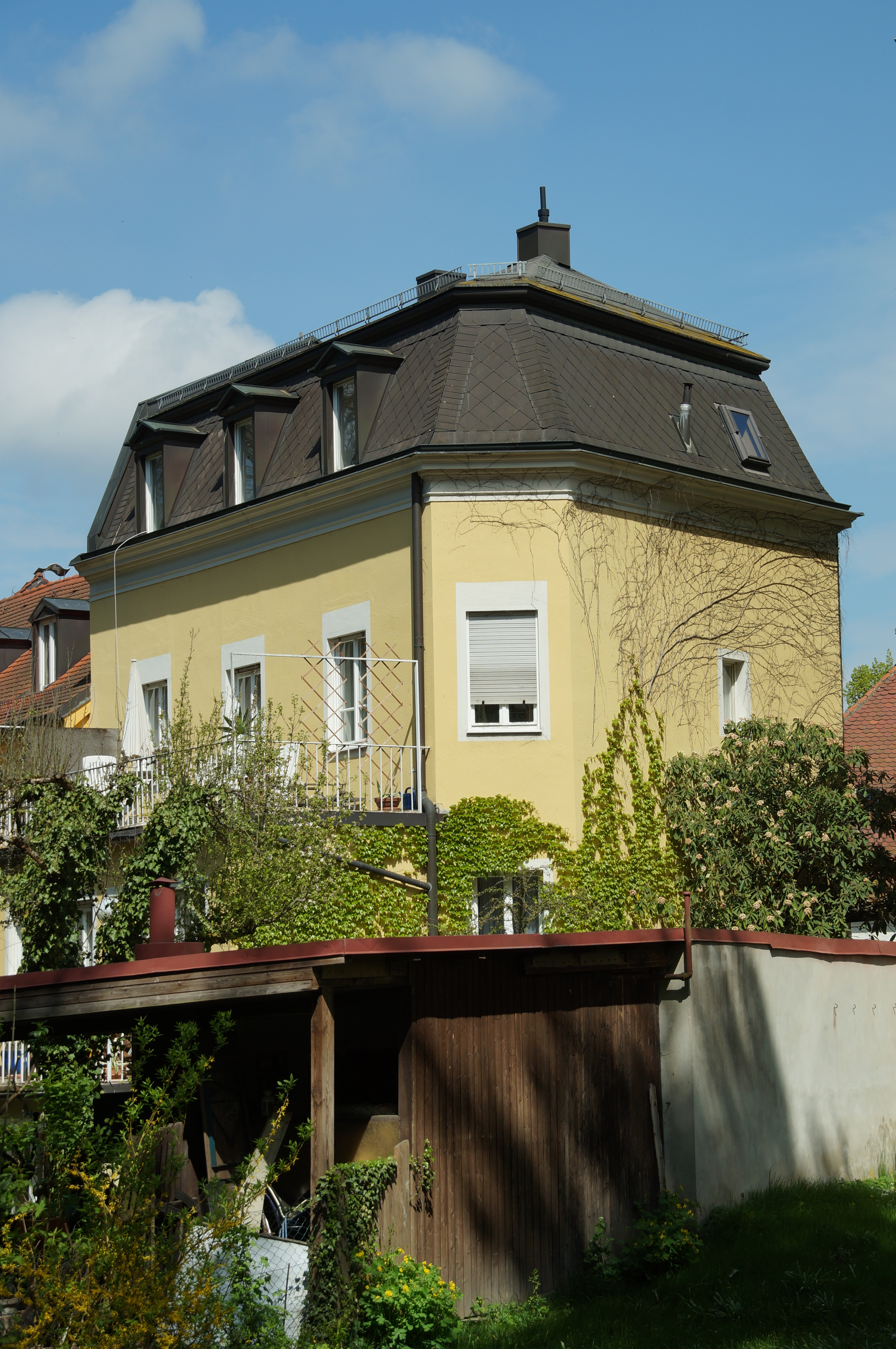 Wohnhaus, zweigeschossiger und traufständiger Mansarddachbau, neubarock, 1894 von Christian Zinstag, 1954 erweitert This is a photograph of an architectural monument.